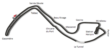 Verzia trate z rokov 1950 až 1972.